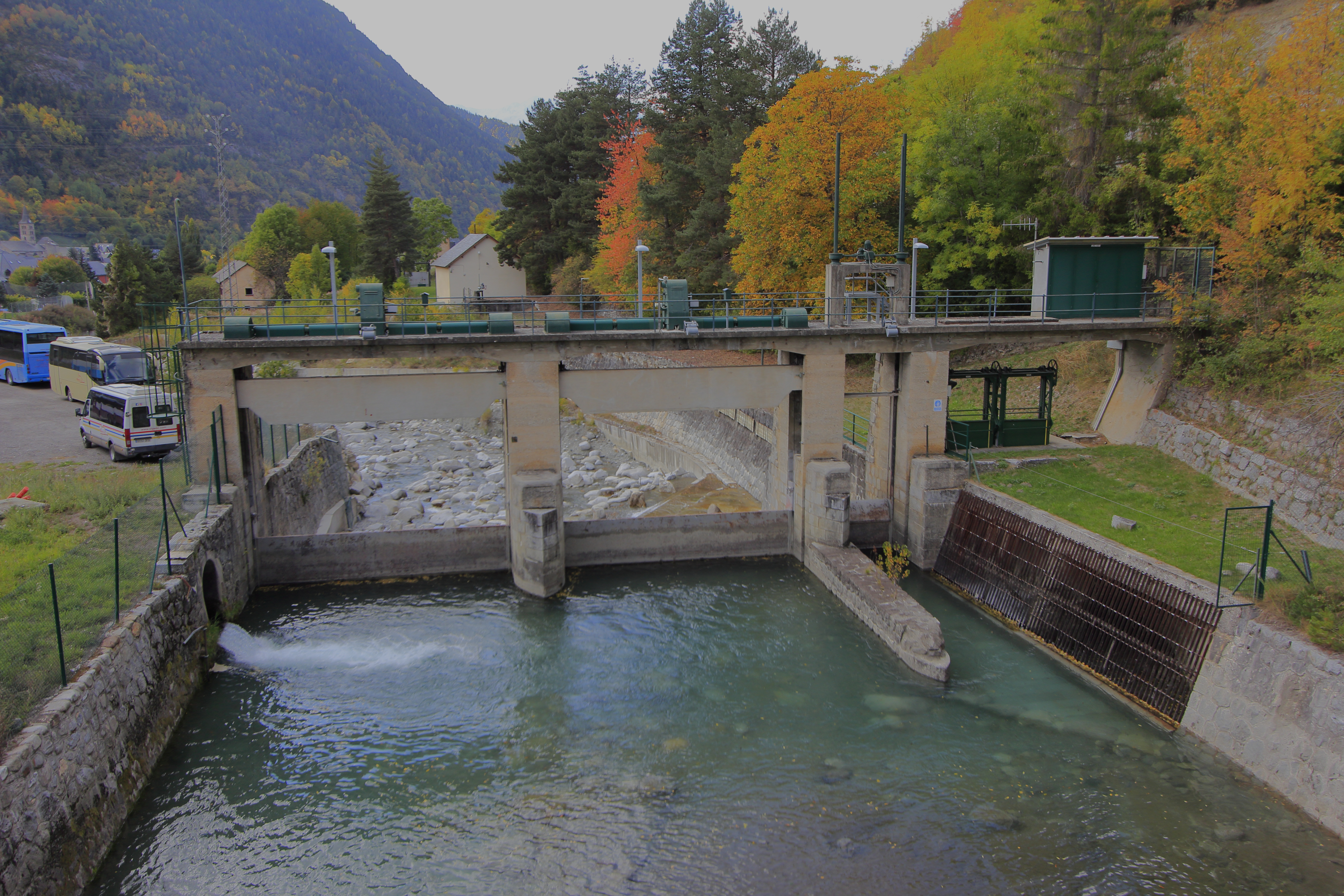 Assut de la Central Hidroelèctrica d'Arties